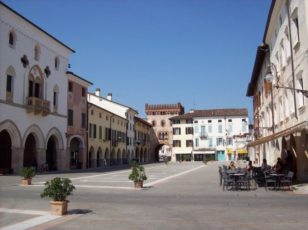 San Vito al Tagliamento (PN) - Piazza del Popolo, parte occidentale con la Loggia Pubblica a la sinistra e il Torre Raimona in fondo.Template:En1=San Vito al Tagliamento in Friuli Venezia Giulia region: central place called Piazza del Popolo, eastern part with the Loggia Pubblica (town hall) on the laft and Torre Raimona gate tower in the western end.